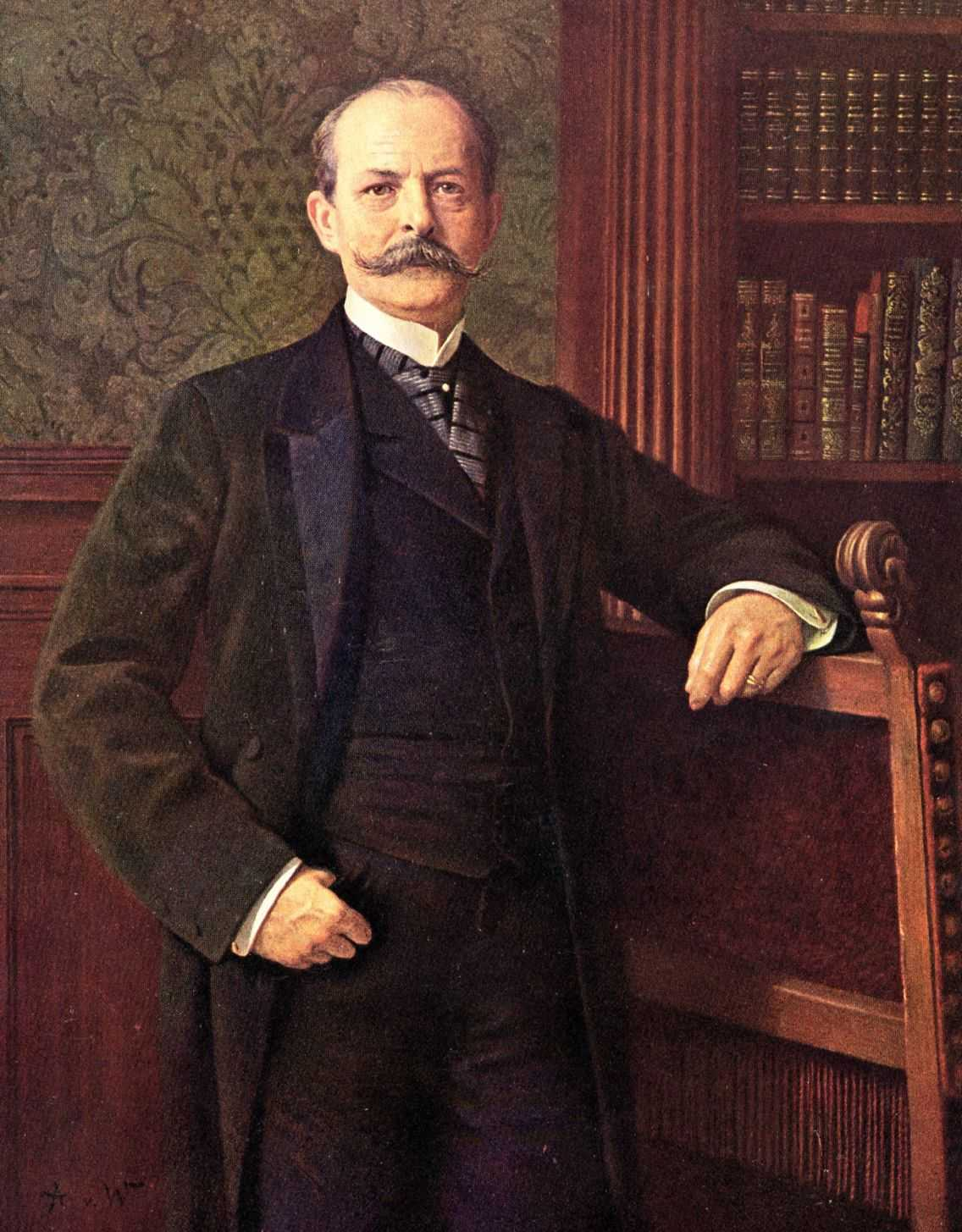 Friedrich Westermann (1840-1909), german publisher